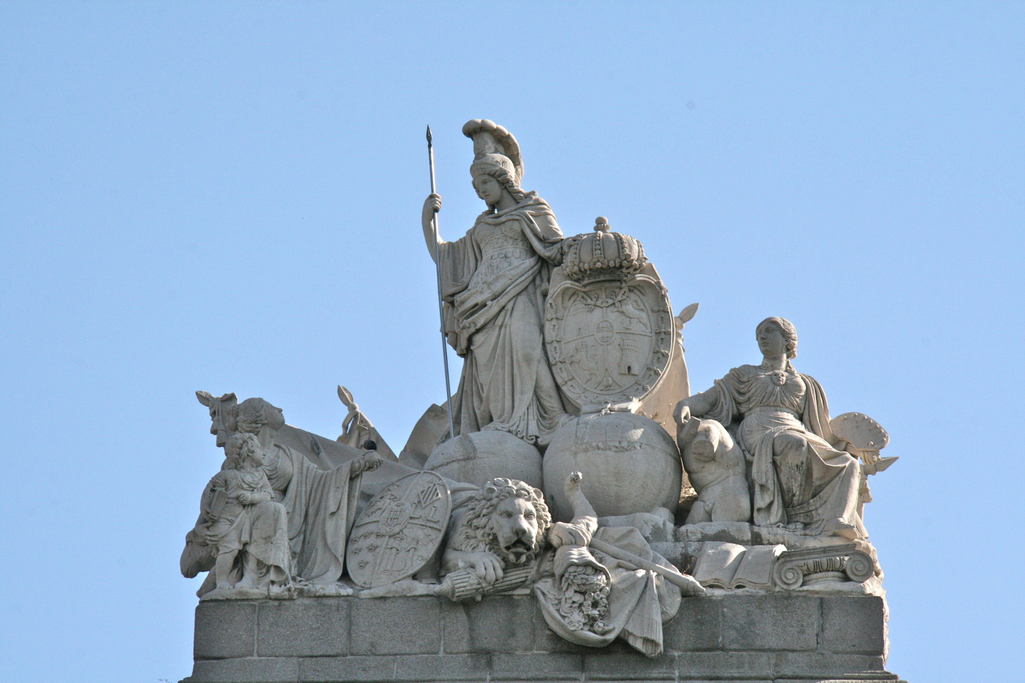 Conjunto Central de Puerta de Toledo